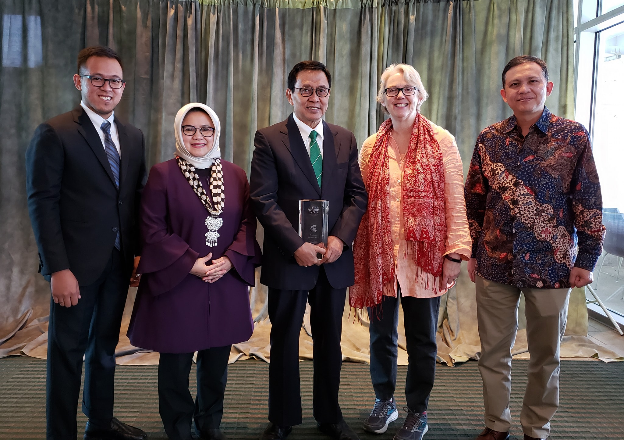 Suyanto menerima Penghargaan Joon S. Moon Distinguished dari Universitas Negeri Michigan, Amerika Serikat.